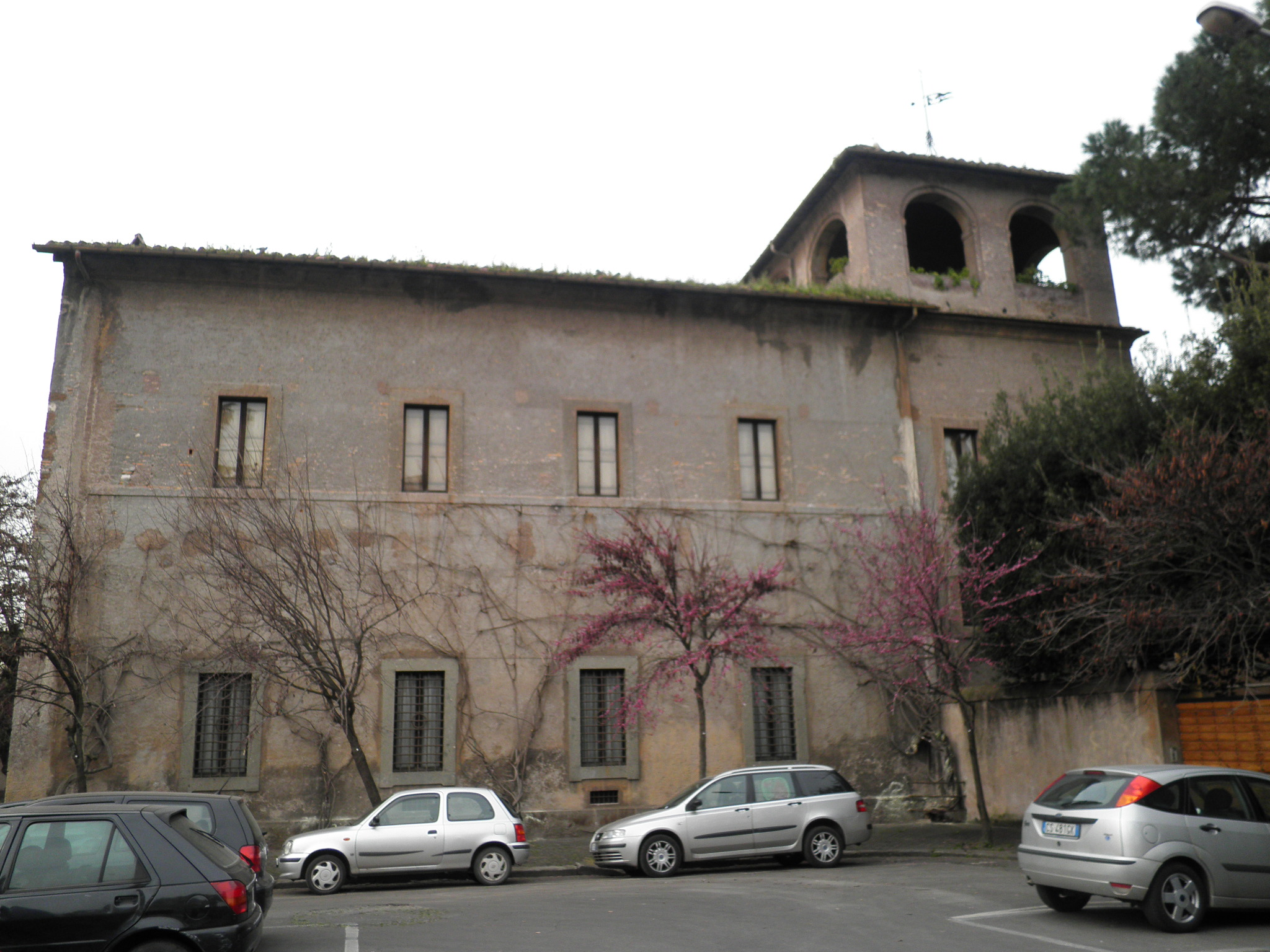 Roma, Casale Torlonia all'Aventino, costruito sui resti delle Terme Deciane